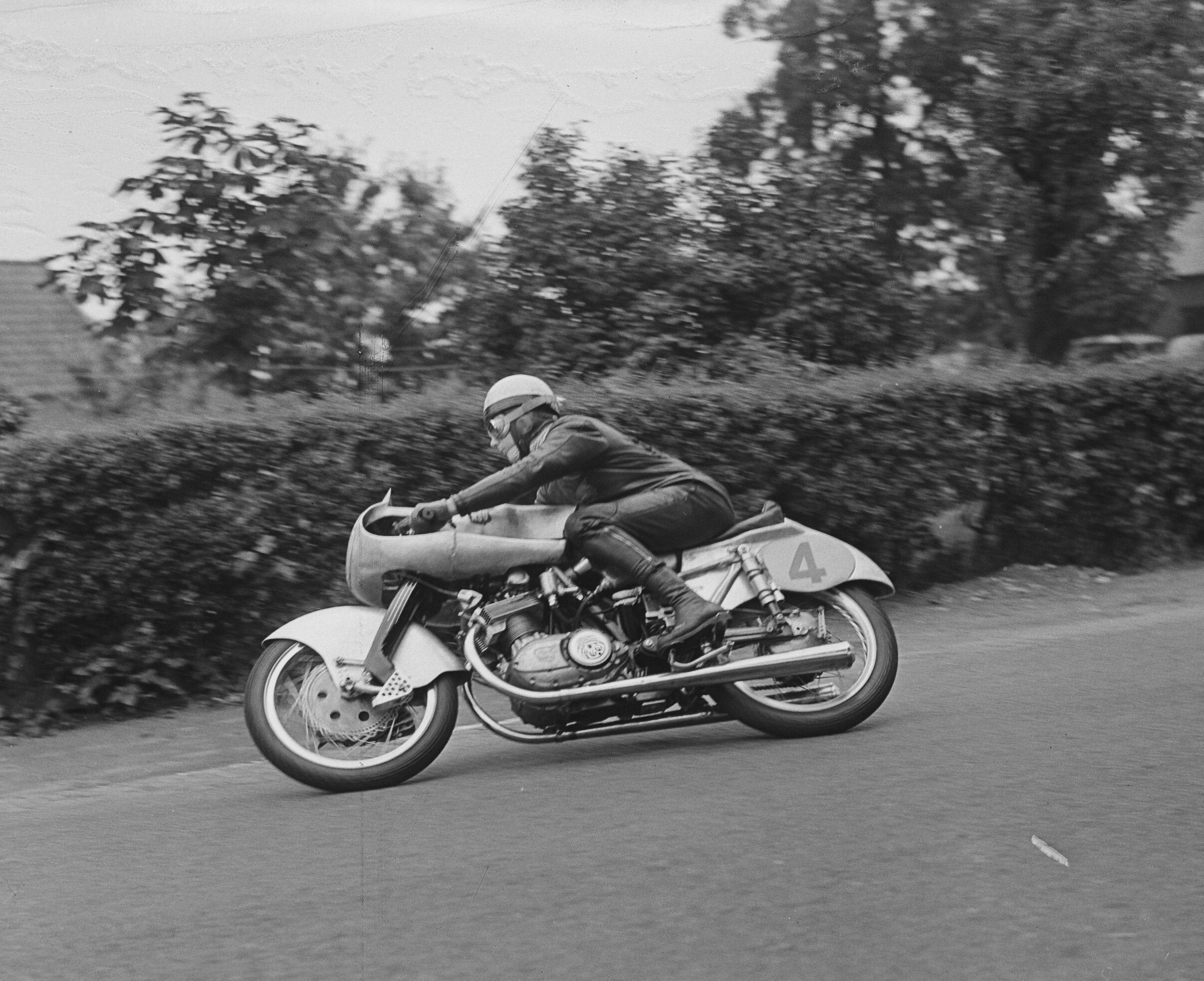 Collectie / Archief : Fotocollectie Anefo Reportage / Serie : TT Assen 1953 Beschrijving : 250cc klasse. Winnaar Werner Haas op NSU Datum : 28 juni 1953 Locatie : Assen Trefwoorden : Winnaars, motorsport Persoonsnaam : Haas, Werner Fotograaf : Bilsen, Joop van / Anefo Auteursrechthebbende : Nationaal Archief Materiaalsoort : Glasnegatief Nummer archiefinventaris : bekijk toegang 2.24.01.09 Bestanddeelnummer : 905-8050